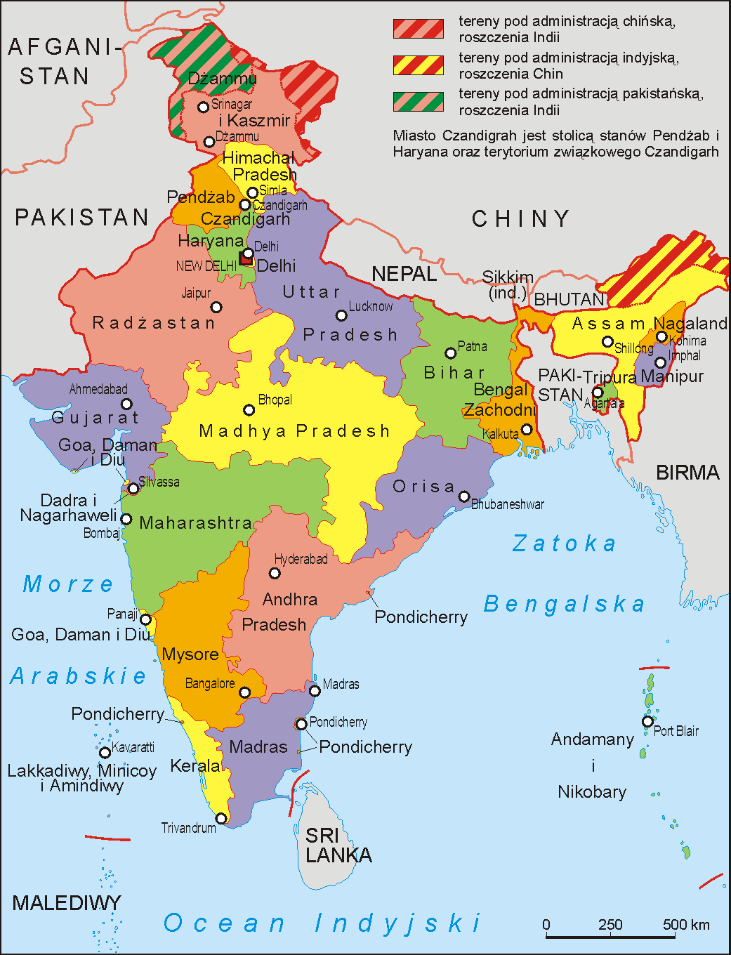 Podział administracyjny Indii w 1966 roku. Autor Aotearoa